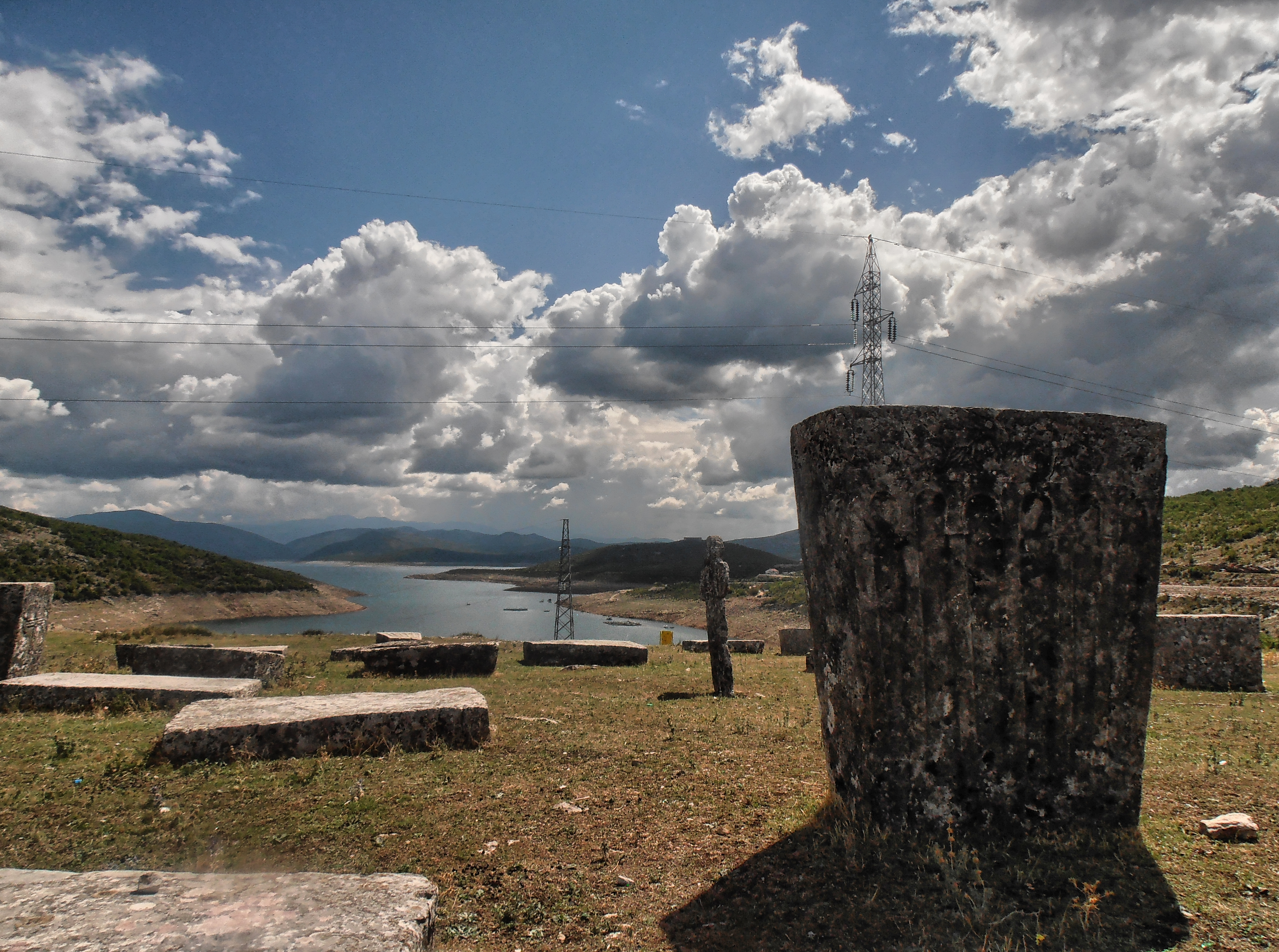 NKD256 Nekropola stećaka Bileća